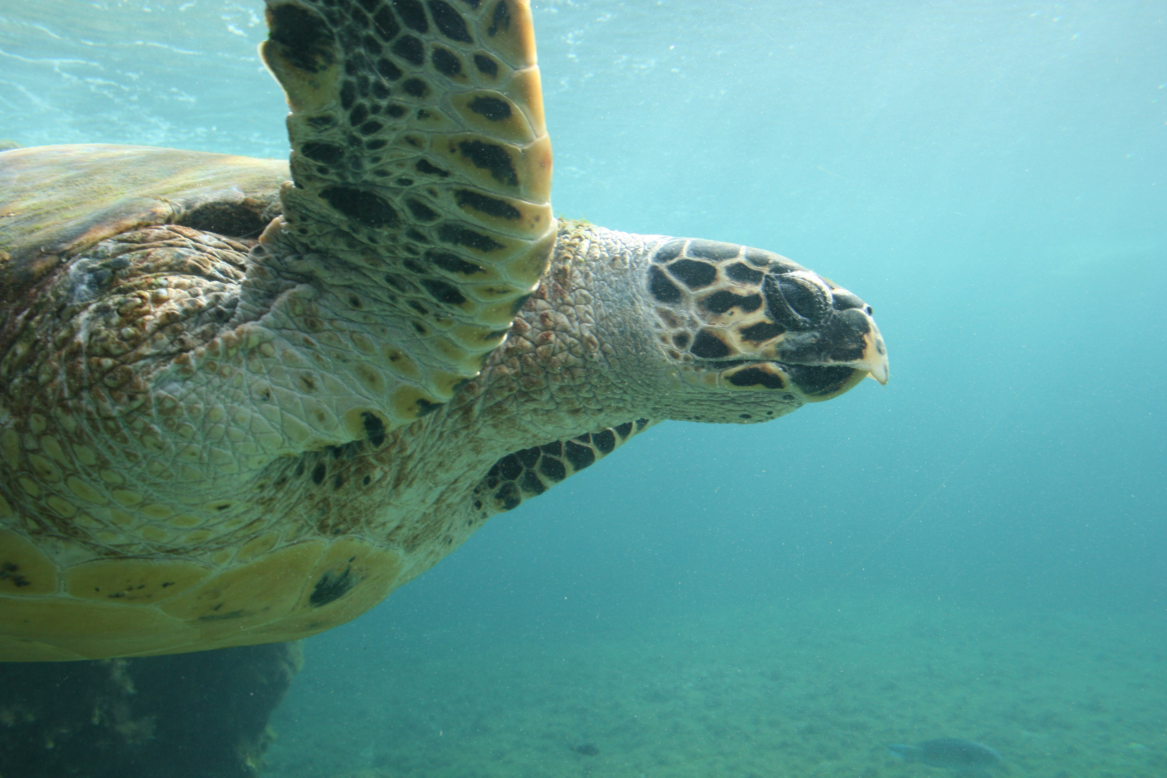 Tortue imbriquée à Kélonia